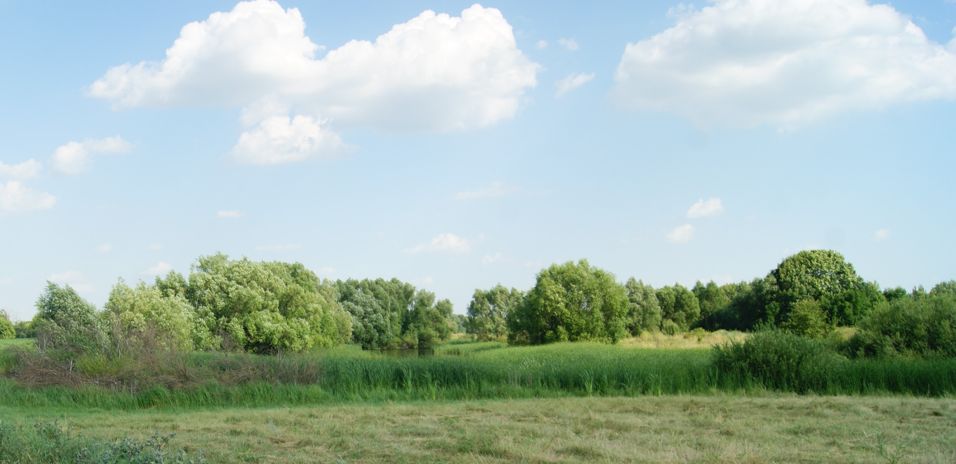 Пруд в усадьбе Филиппова/View of the pond and the former estate of Filippov near the village of Alekseevka, Dobrinsky district, Lipetsk region.